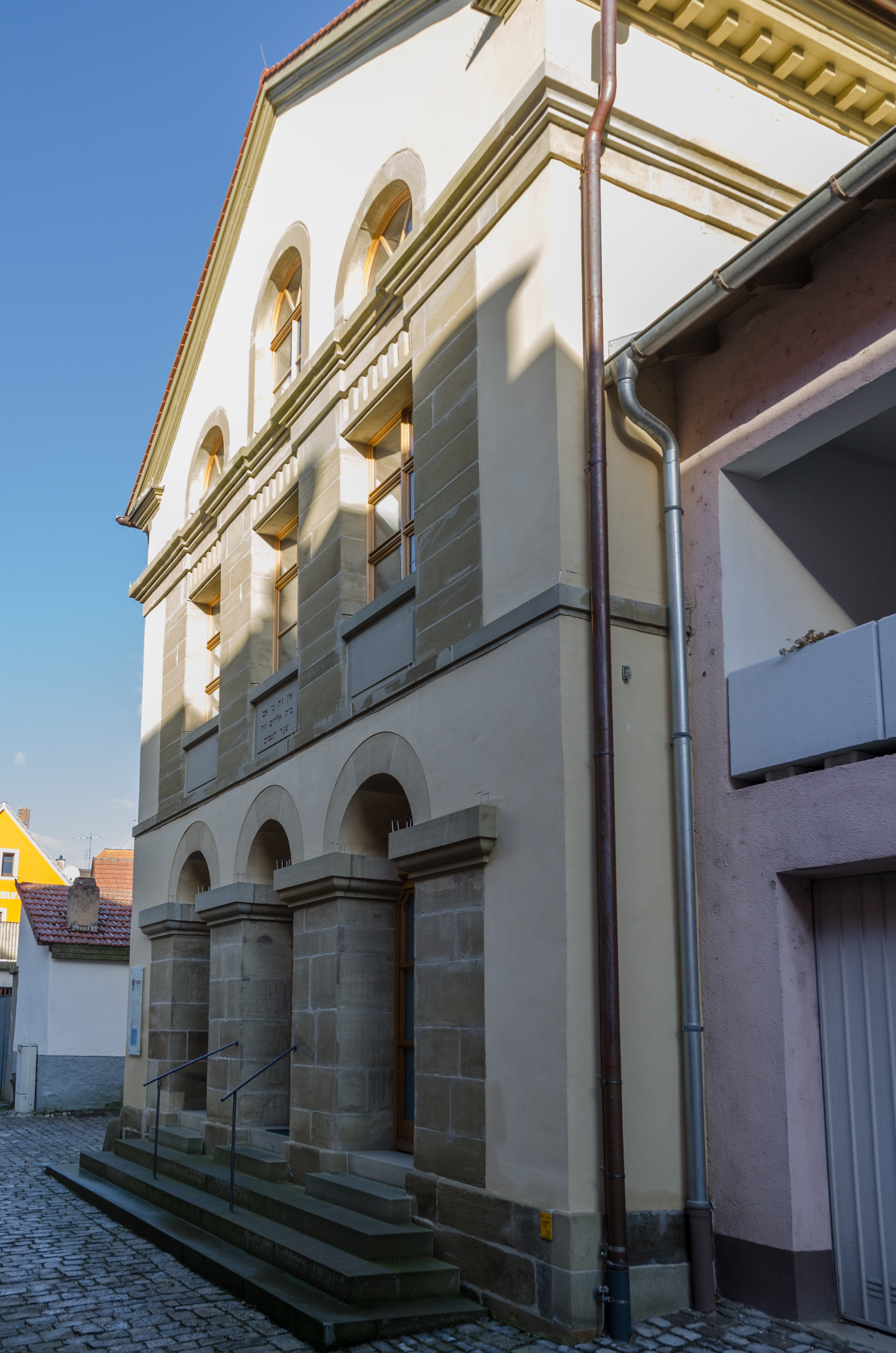 Arnstein, Goldgasse 28, Synagoge